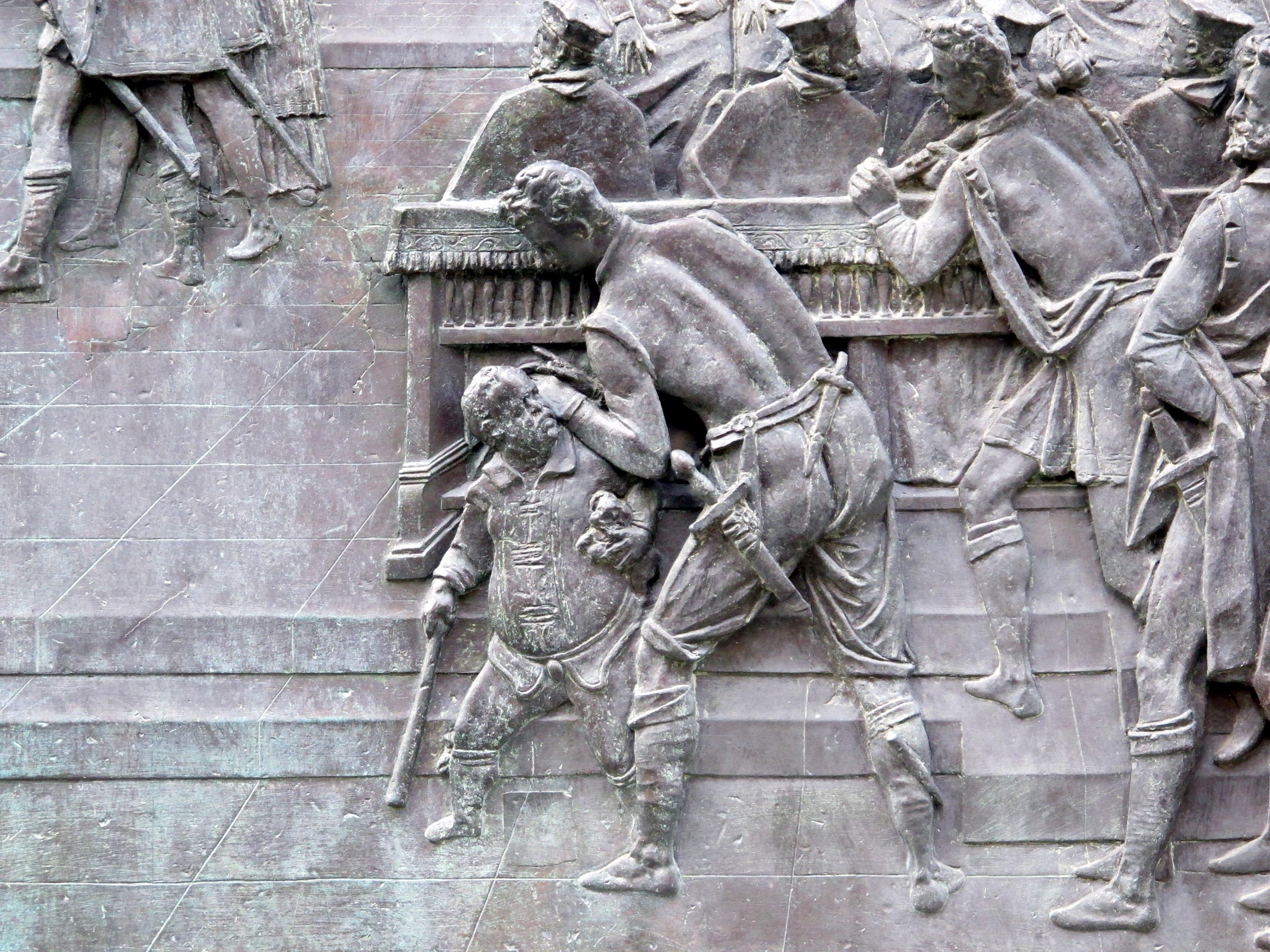 Gaimbologna e pietro tacca, monum a cosimo I, base 04 nano morgante